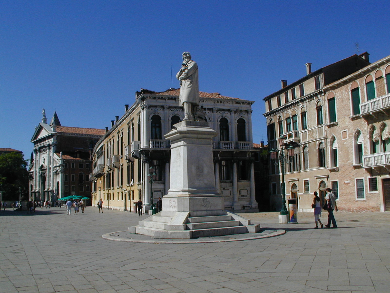 Campo San Stefano la foto è stata scattata da me nell'agosto 2001 a Venezia. In primo piano la statua di Nicolò Tommaseo e sullo sfondo il Palazzo Loredan e la chiesa di S.Vitale. Categoria:Immagini di Venezia